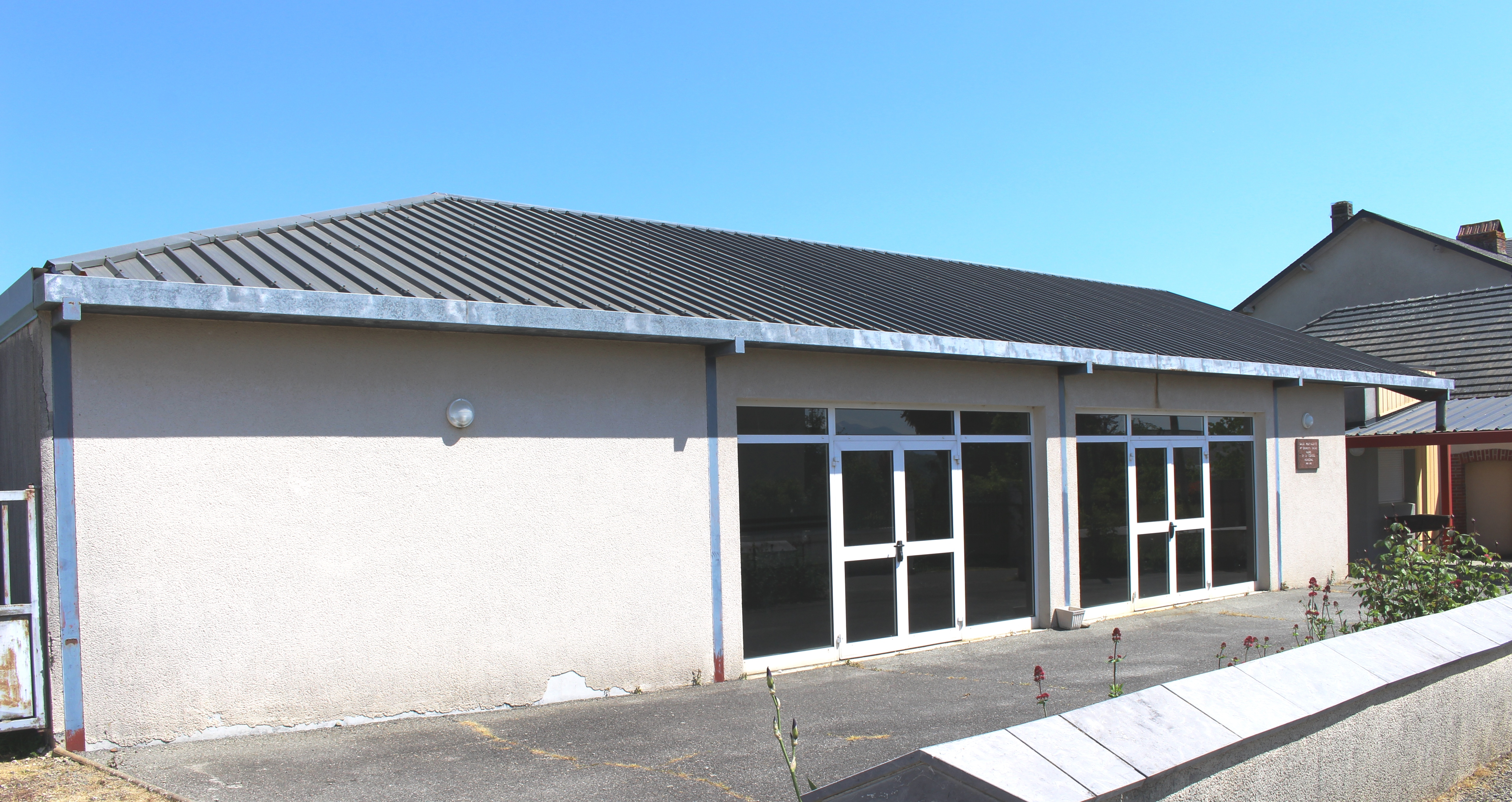 Salle des fêtes de Hourc (Hautes-Pyrénées)